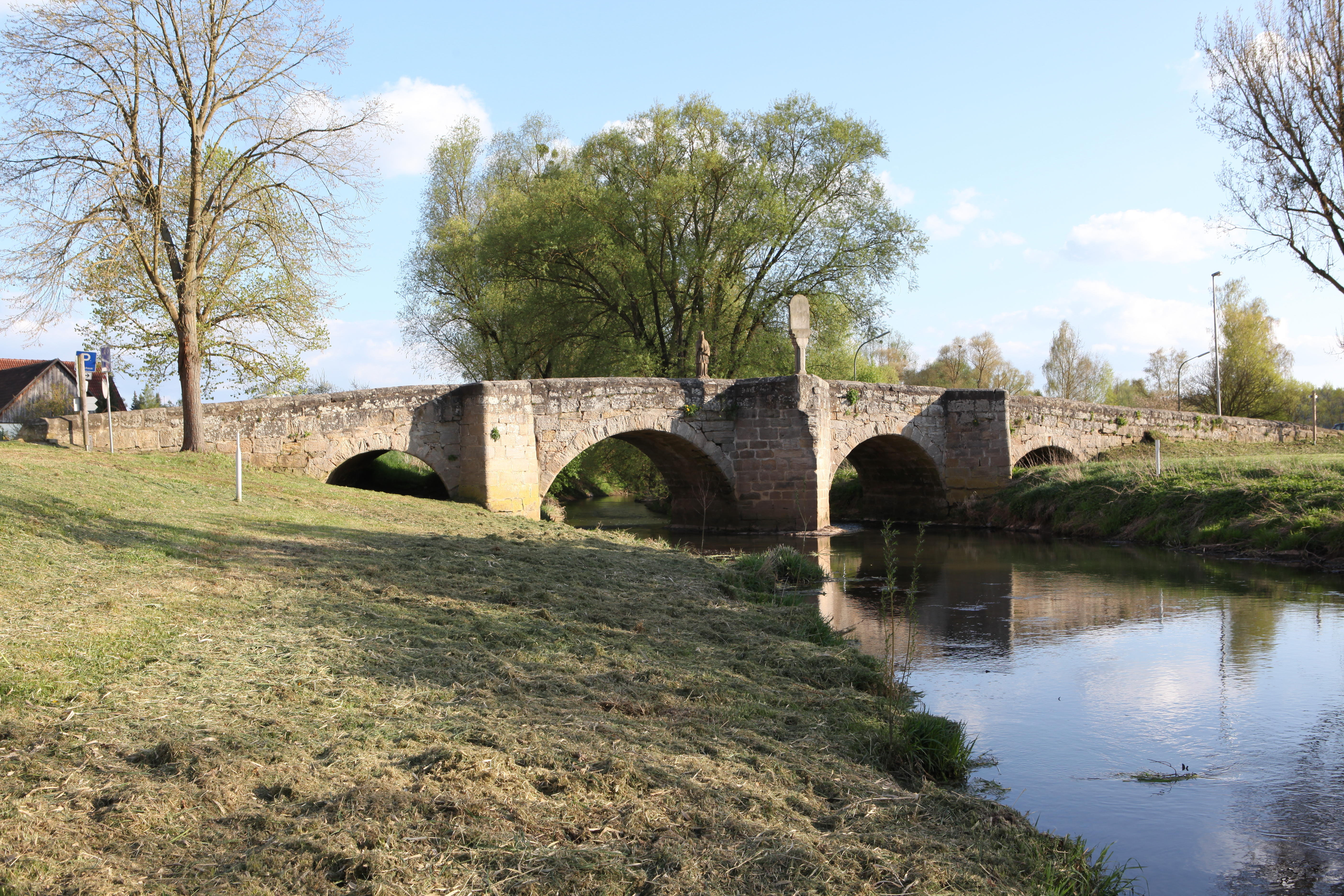 Seßlach Innere Rodachbrücke